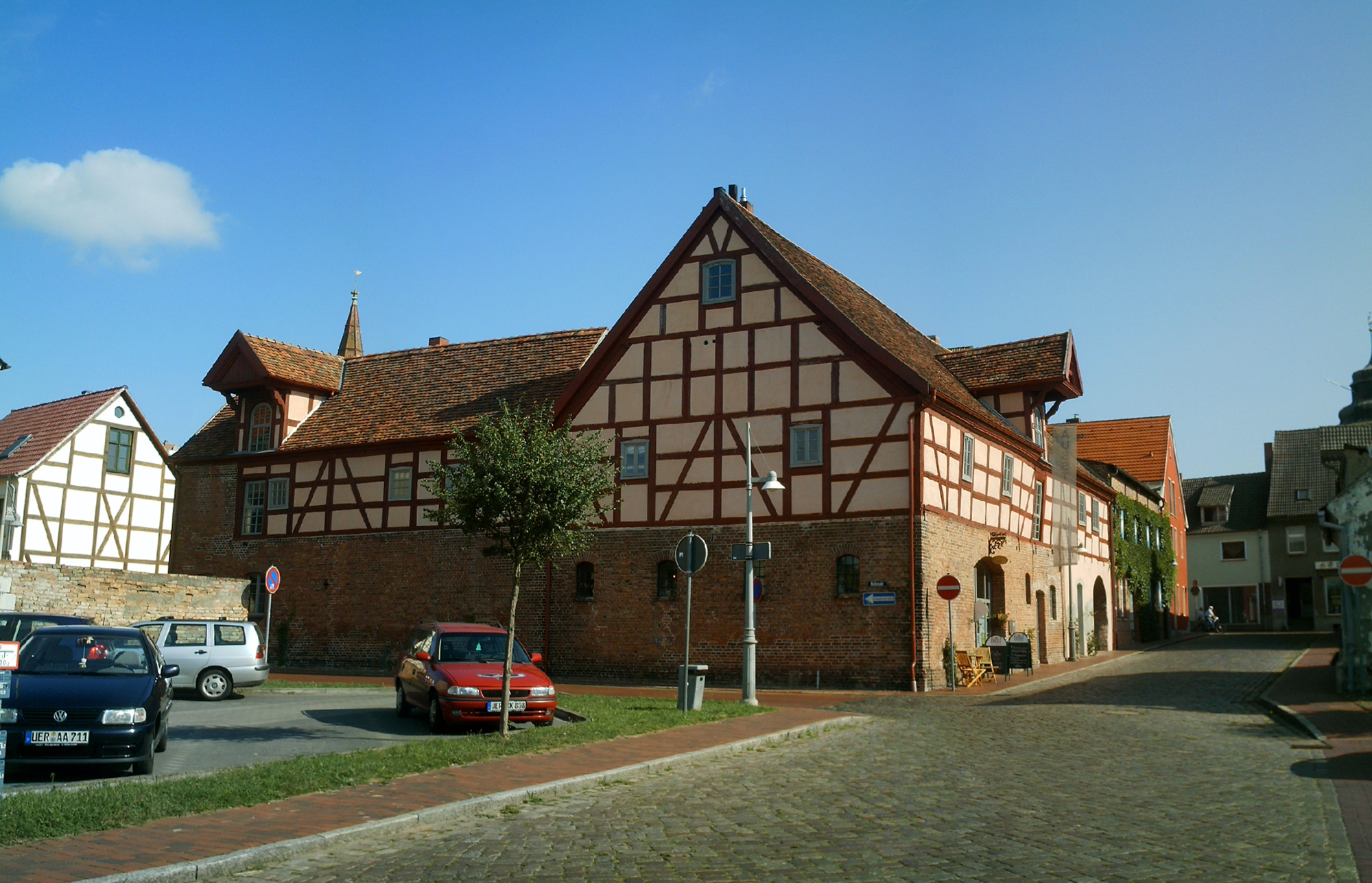 Kulturspeicher, dort finden Ausstellungen, Lesungen, etc. statt